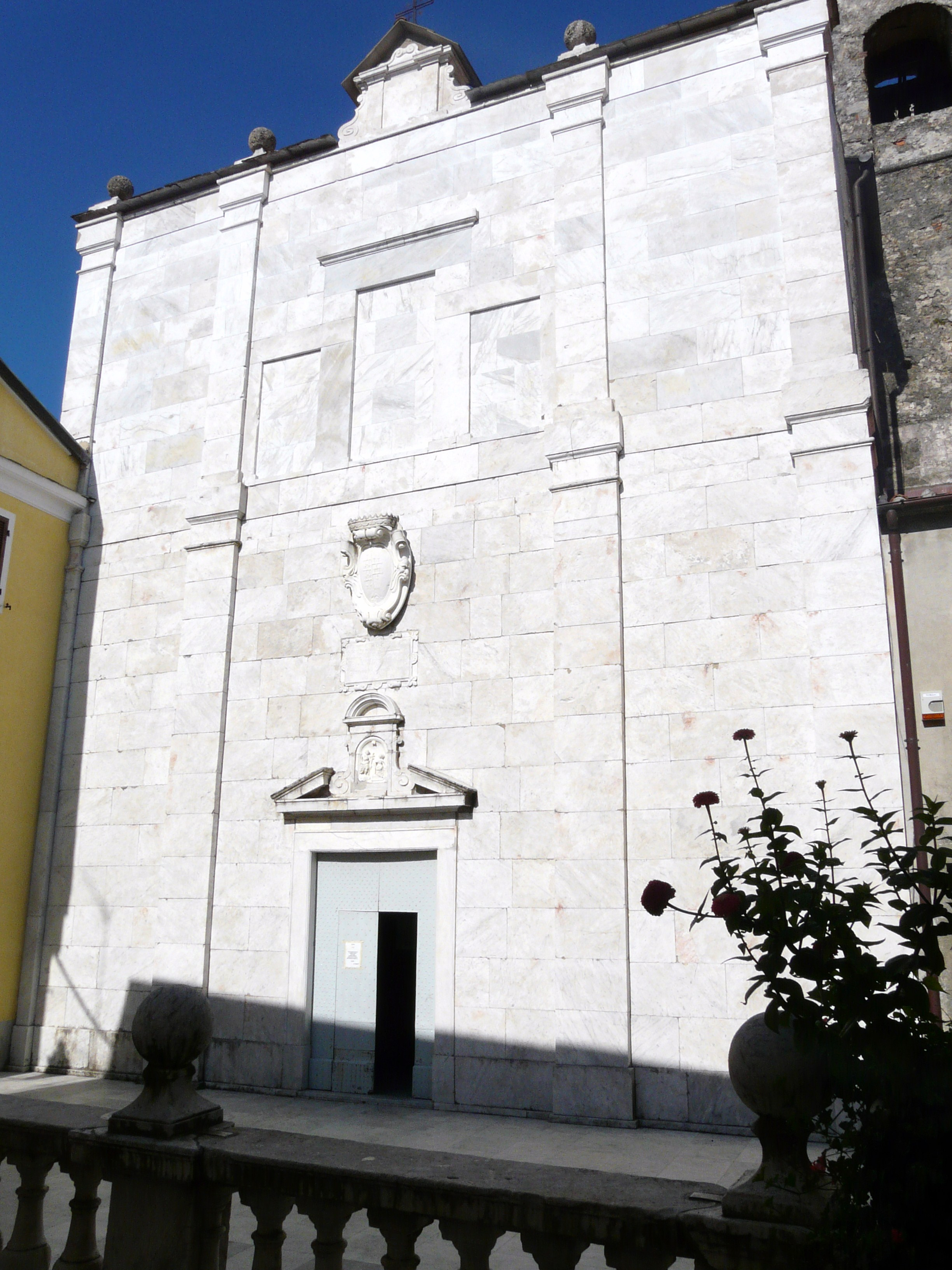 Oratorio dei Bianchi, Fosdinovo, Toscana, Italia